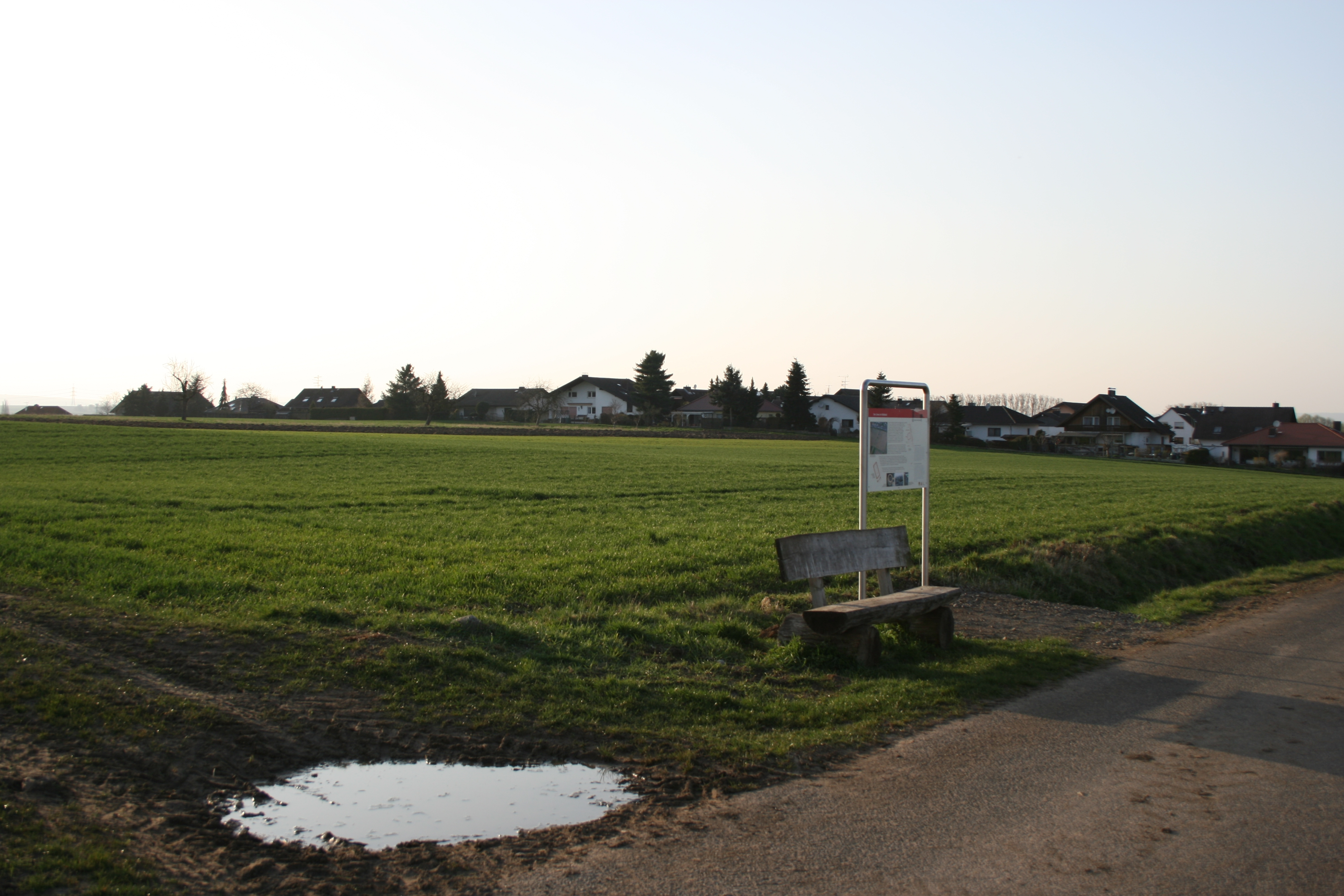 Kastell Ober-Florstadt, Florstadt, Hessen. Ansicht des Kastellgeländes, Zustand 2009 mit Schautafel.